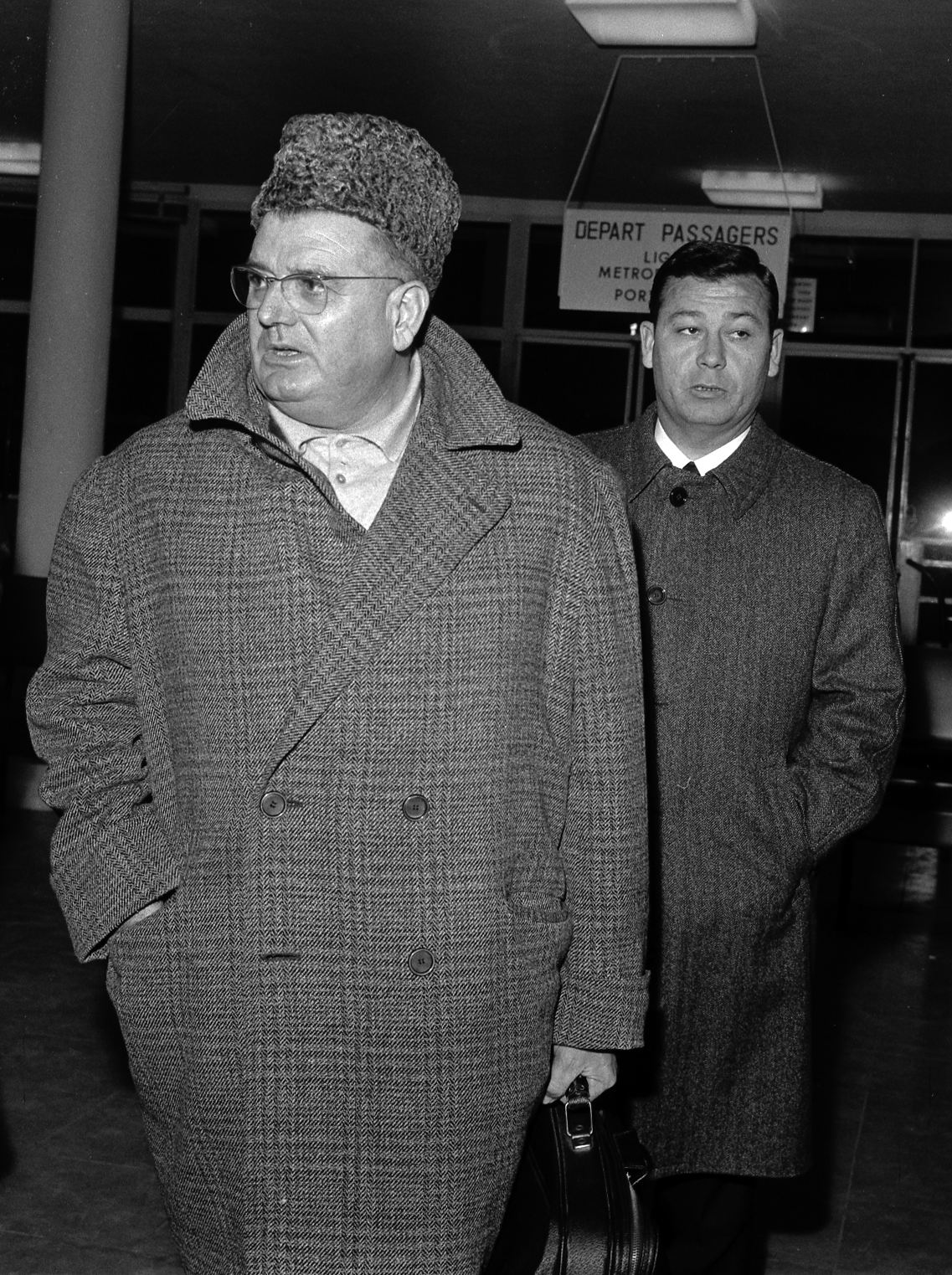 Hall de l'Aérogare Blagnac 1. 20 janvier 1967. Au 1er plan Jean-Baptiste Doumeng (président du Toulouse Football Club), plan 3/4, vue de face ; derrière lui Just Fontaine (ancien footballeur).